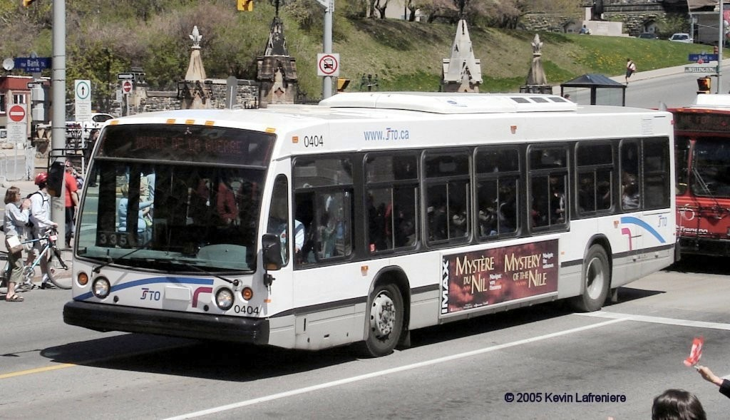 Autobus de la STO (Société de transport de l'Outaouais)